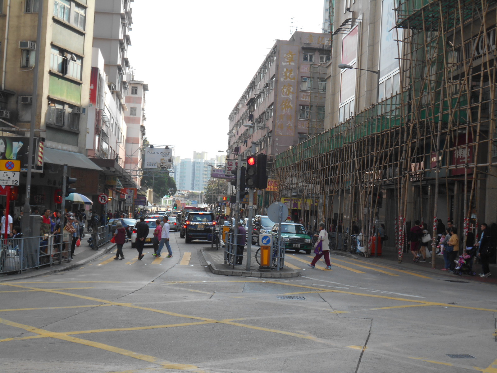 中文（香港）: 元朗大棠路近千色廣場(2016年聖誕翌日)